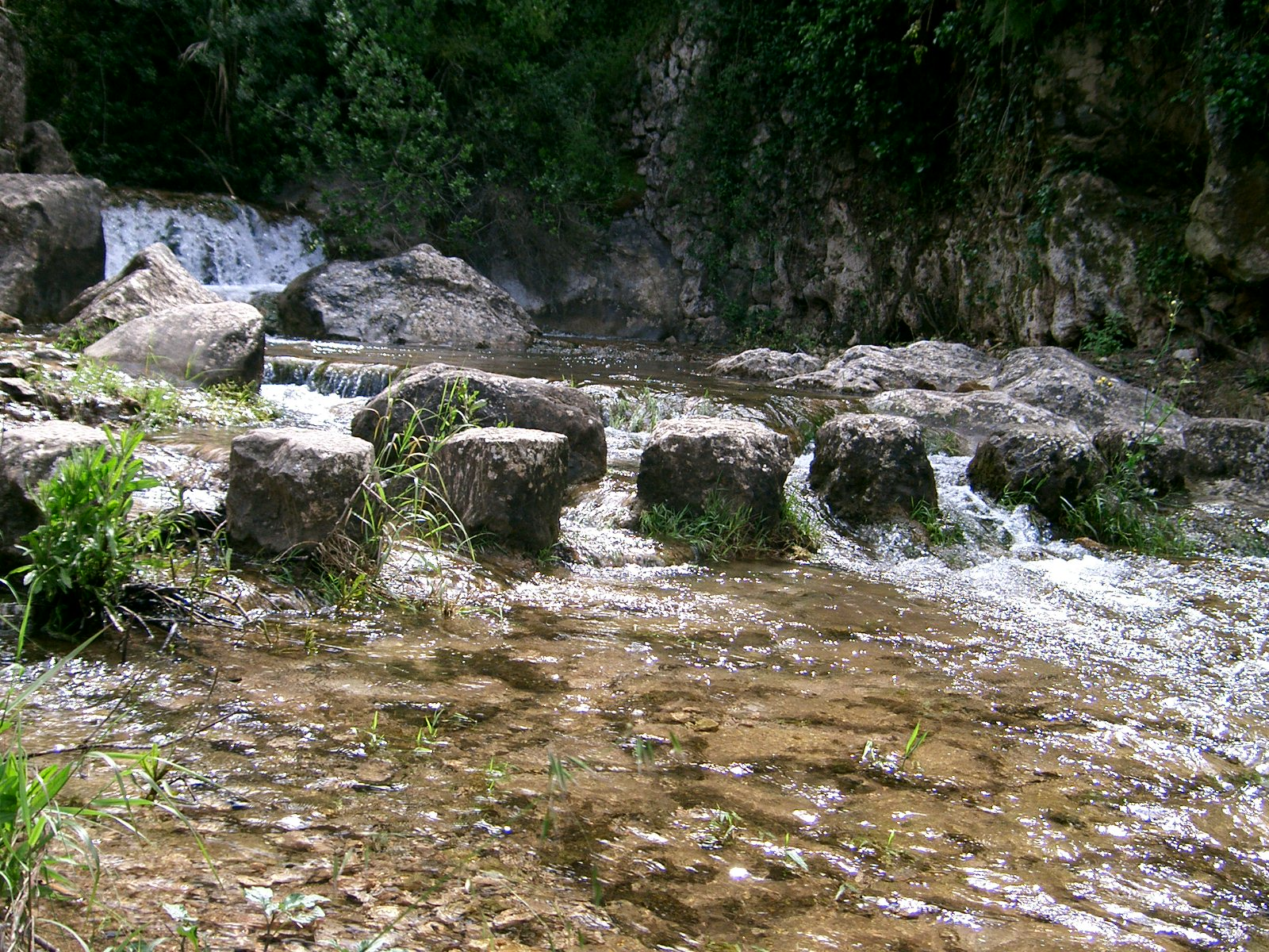 Passadores al torrent de Fornalutx, Mallorca.